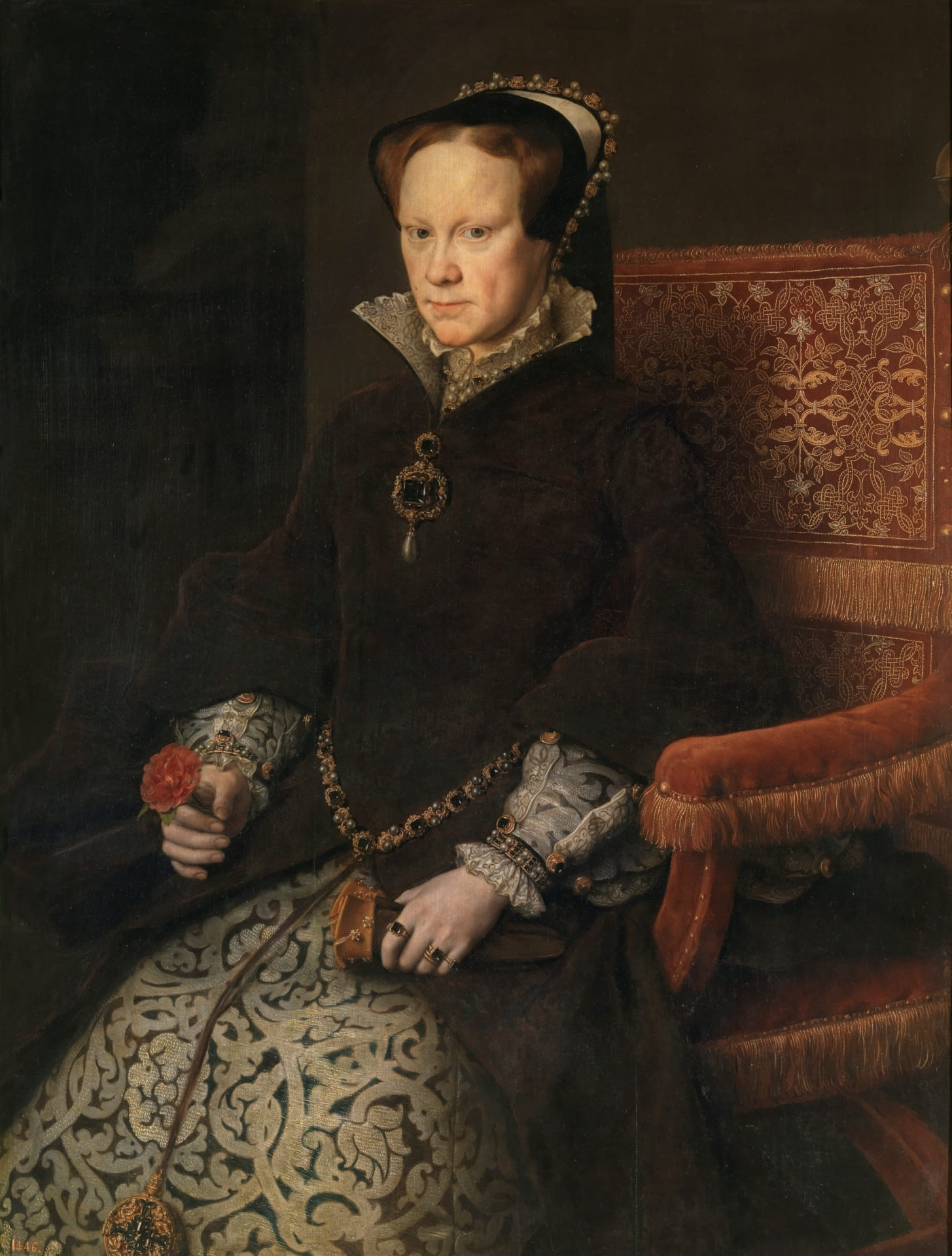 Retrato de la reina María I de Inglaterra (1516-1558), más conocida como María Tudor, que fue hija del rey Enrique VIII de Inglaterra y de la reina Catalina de Aragón y reina consorte de España por su matrimonio con Felipe II, hijo del emperador Carlos I de España.